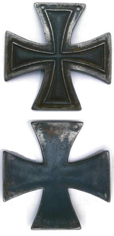 Kulmer Kruis 1813